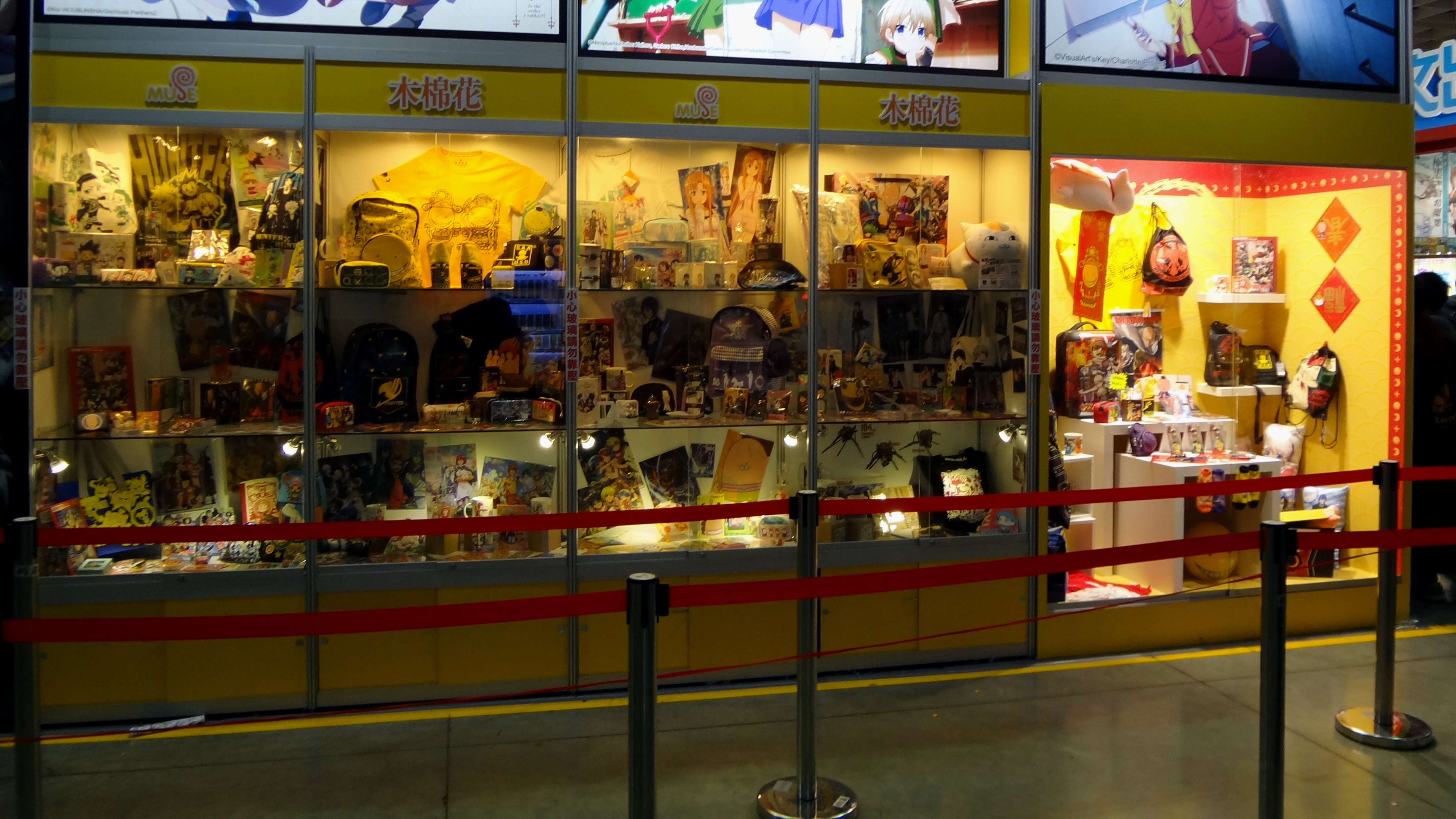 中文（台灣）: 2016年第四屆台北國際動漫節，木棉花國際攤位精品展示窗。